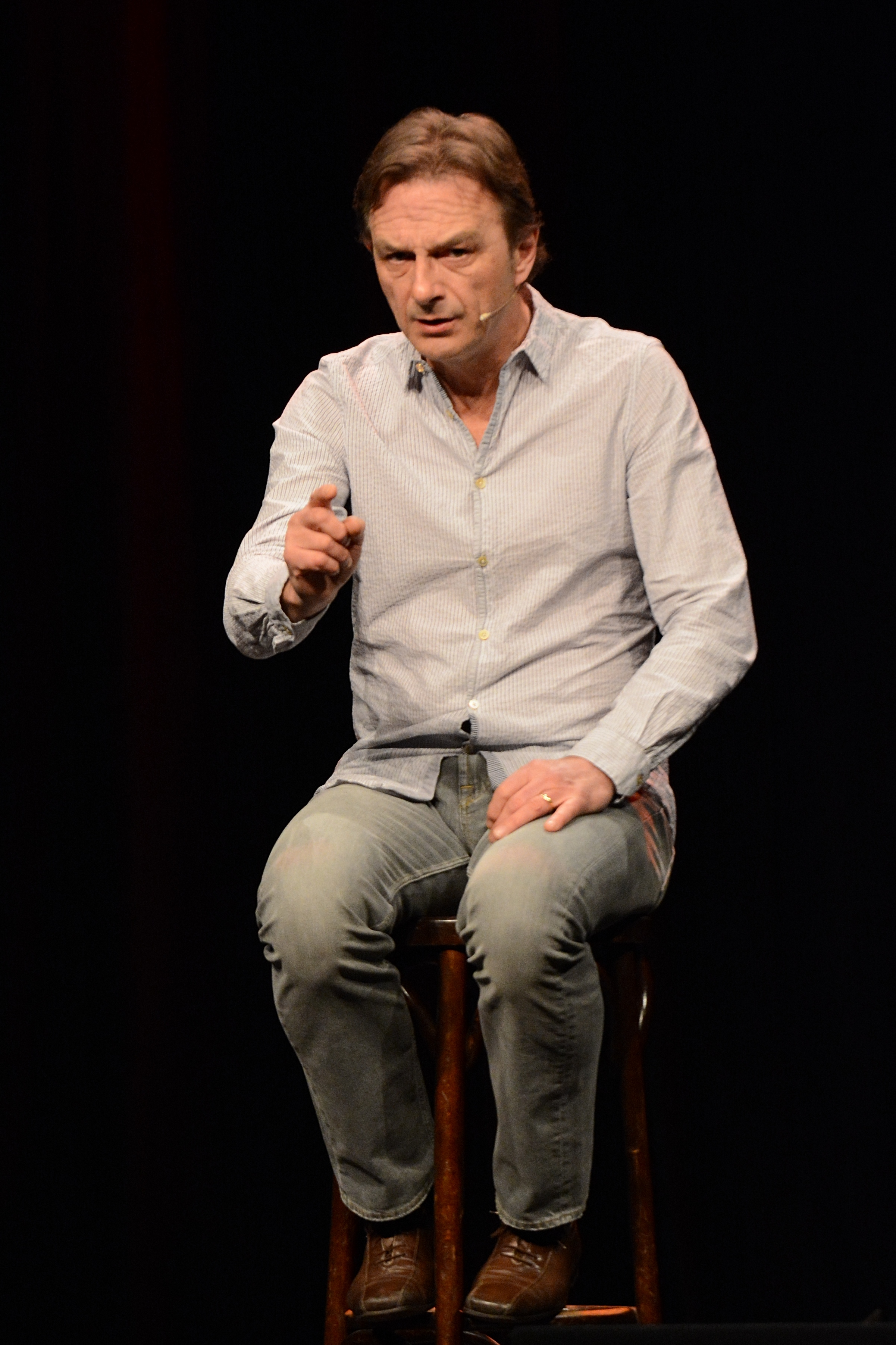 Fritz Eckenga beim Unpolitischen Aschermittwoch 2014 im Ebertbad Oberhausen.